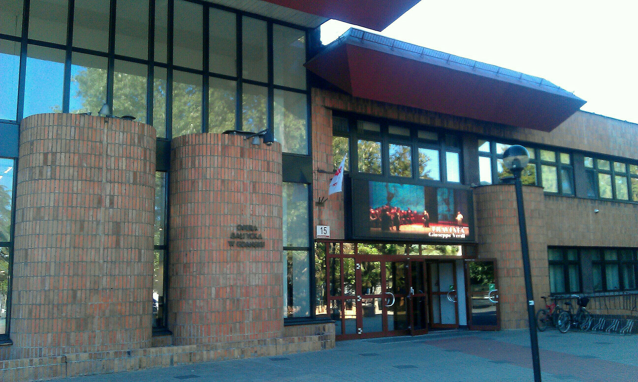 Danzig Baltische Staatsoper.